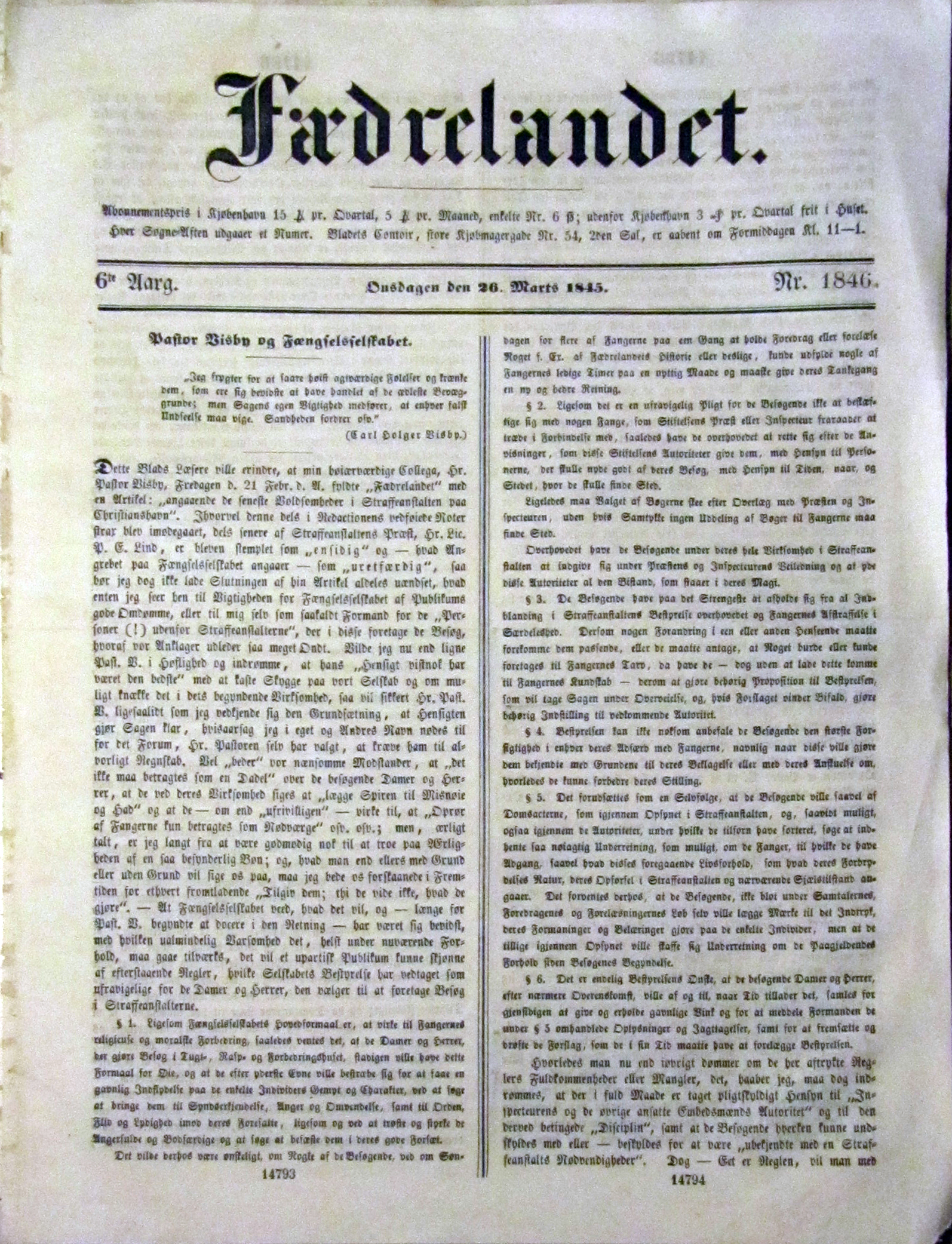 Den nationalliberale avis Fædrelandet, 6. årgang, nr. 1846, onsdag d. 26. marts 1845. Forside artiklen diskuterer fængselsforholdene efter "de seneste Voldsomheder i Straffeanstalten paa Christianshavn".